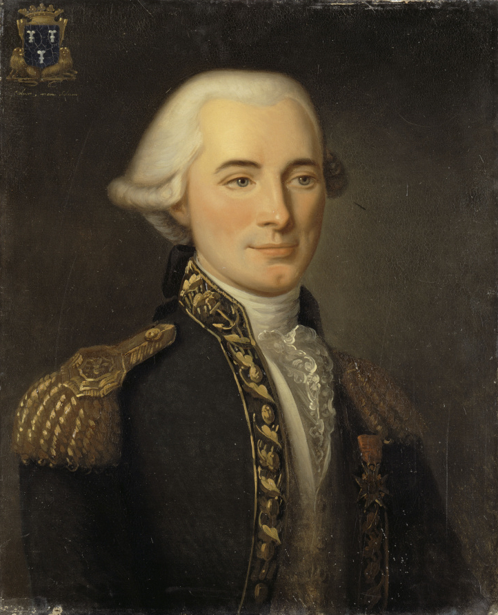 JEAN-FRANCOIS DU CHEYRON, CAPITAINE DE VAISSEAU, huile sur toile, dernier quart du 18ème siècle, école française. Lieu de conservation : Versailles ; musée national des châteaux de Versailles et de Trianon